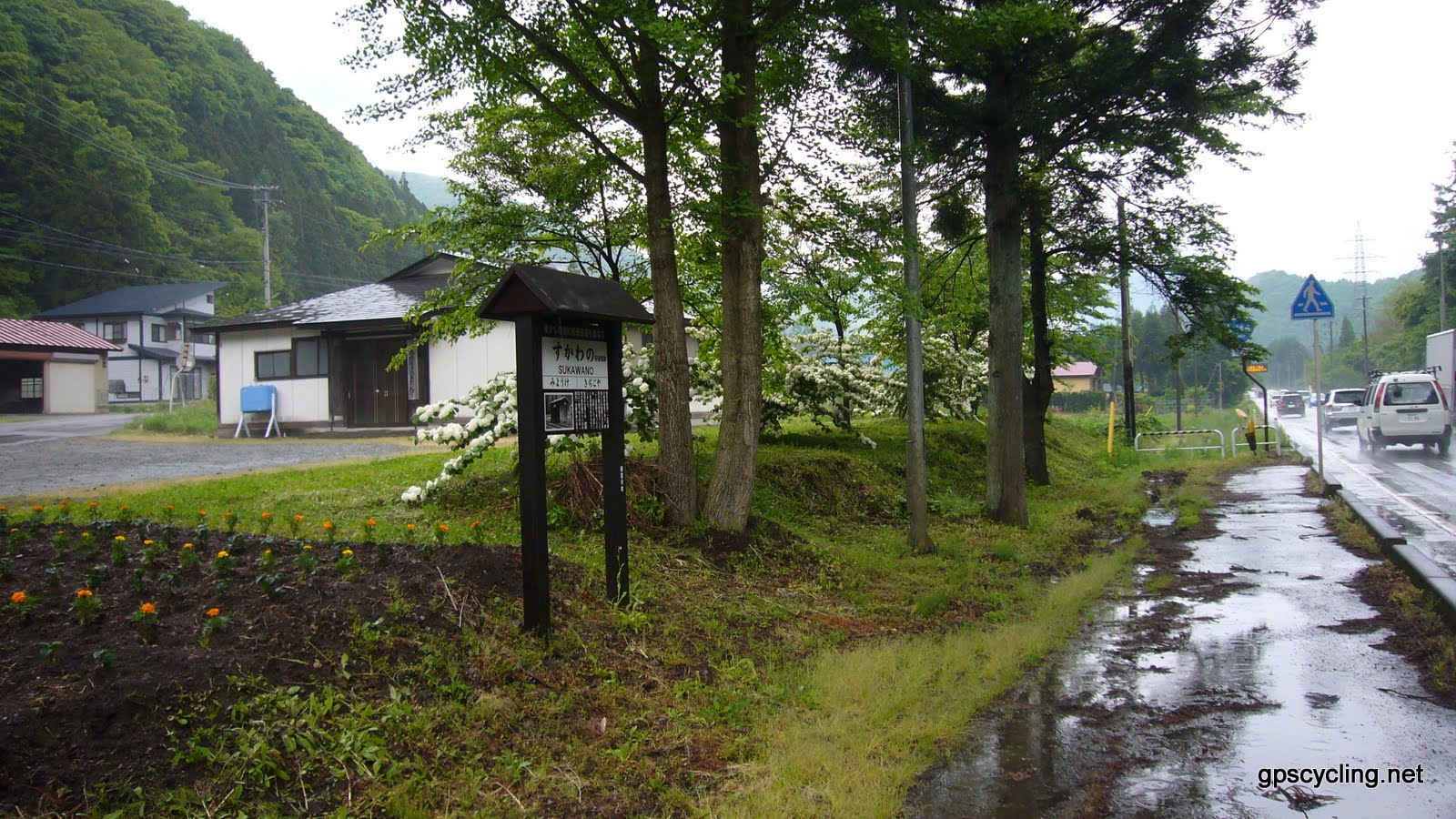 沼尻軽便鉄道酸川野駅跡